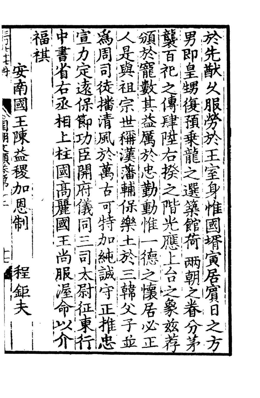 Một trang Tây-bộ tòng-san (四部叢刊) có lược-thuật về Chiêu-quốc vương Trần-ích Tắc (陳益稷, 1254 - 1329).